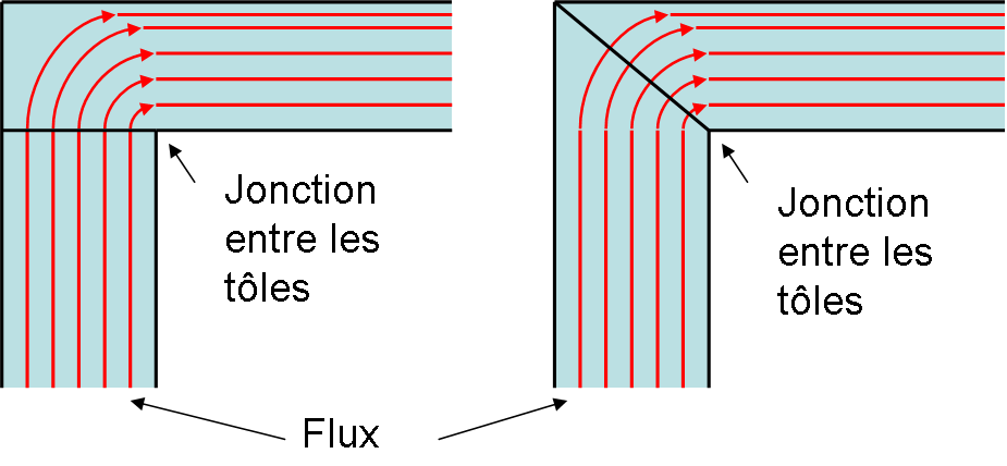 Présentation du problème au coin du noyau magnétique d'un transformateur pour le flux